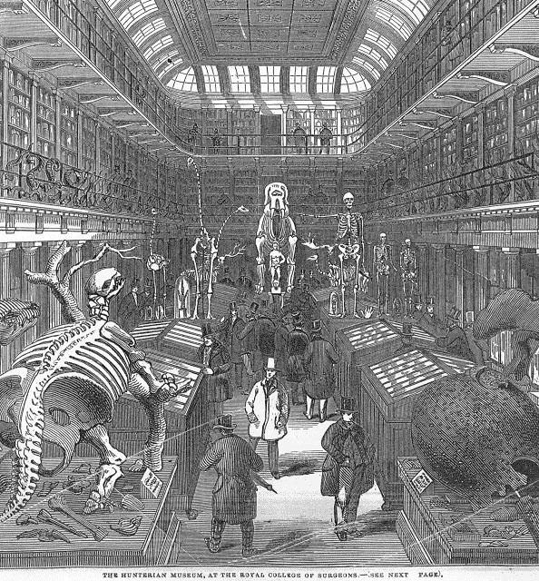 Blick ins Hunterian Museum